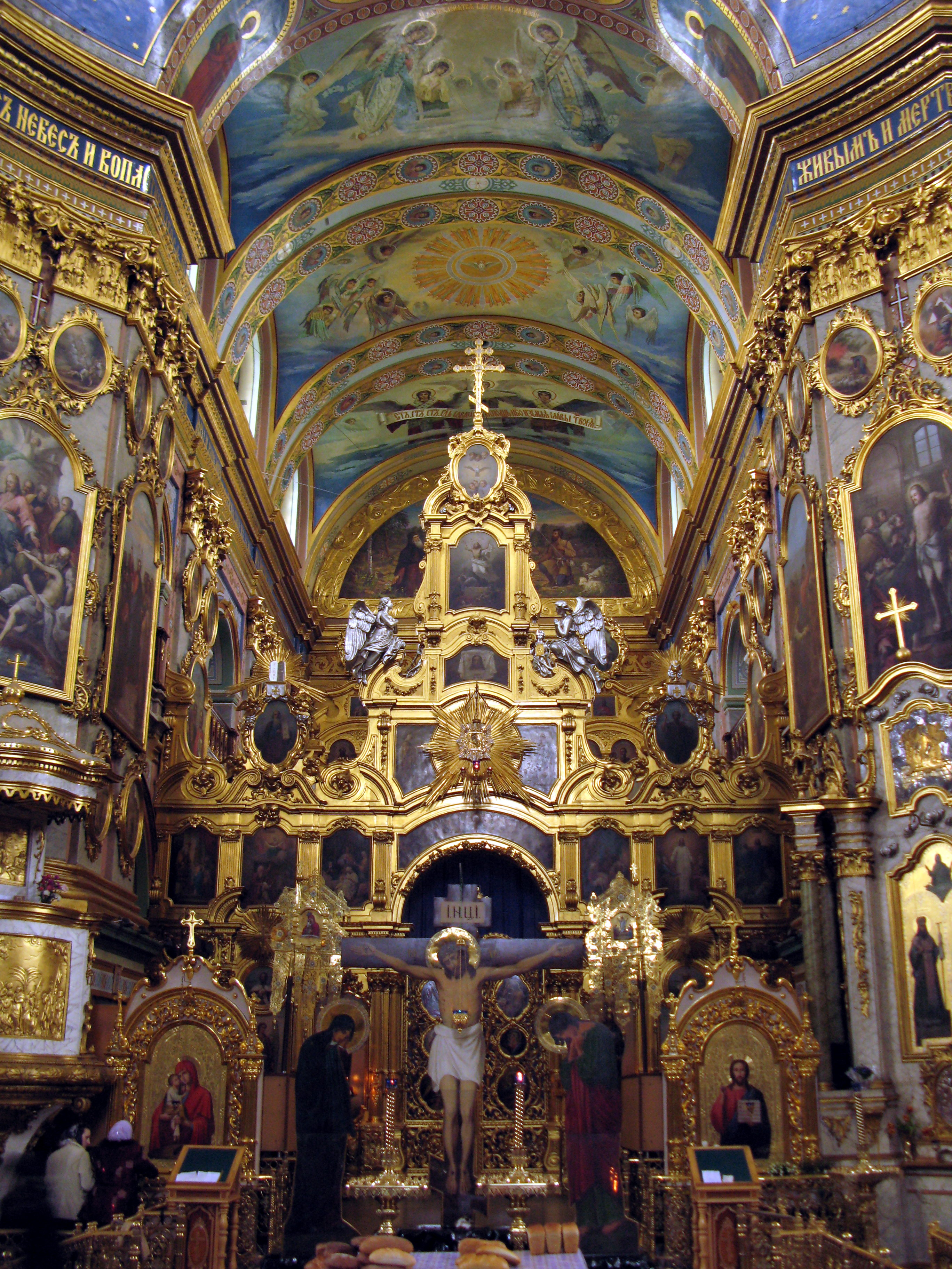 Успенський собор, Почаїв, пл. Возз'єднання